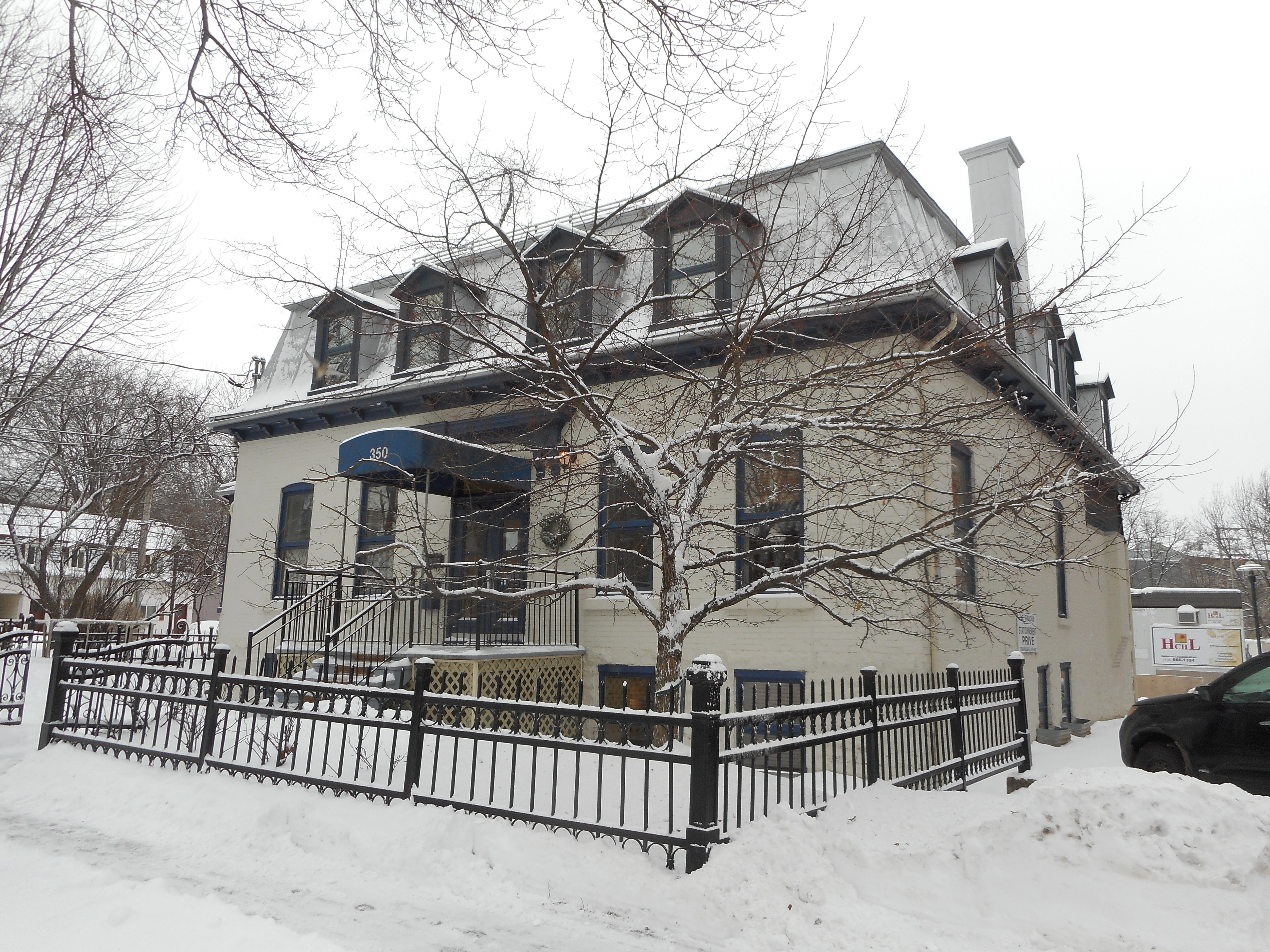 Maison Rivard-Dufresne, 350, boulevard Langelier, Québec « En 1883, Jean-Baptiste Rivard Dufresne fait entreprendre l'édification d'une résidence de prestige coiffée d'un toit mansardé d'esprit Second Empire alors à la mode. »